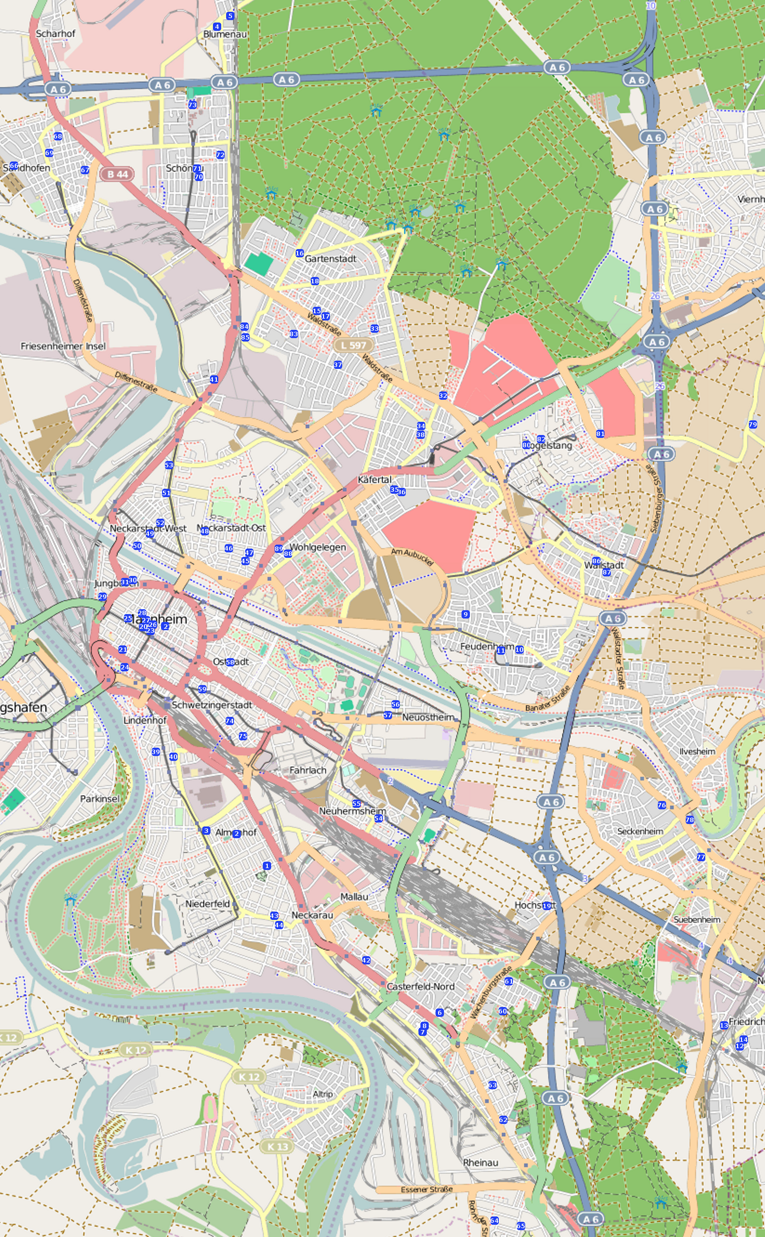 Karte der Sakralbauten in Mannheim This map may be incomplete, and may contain errors. Don't rely solely on it for navigation.